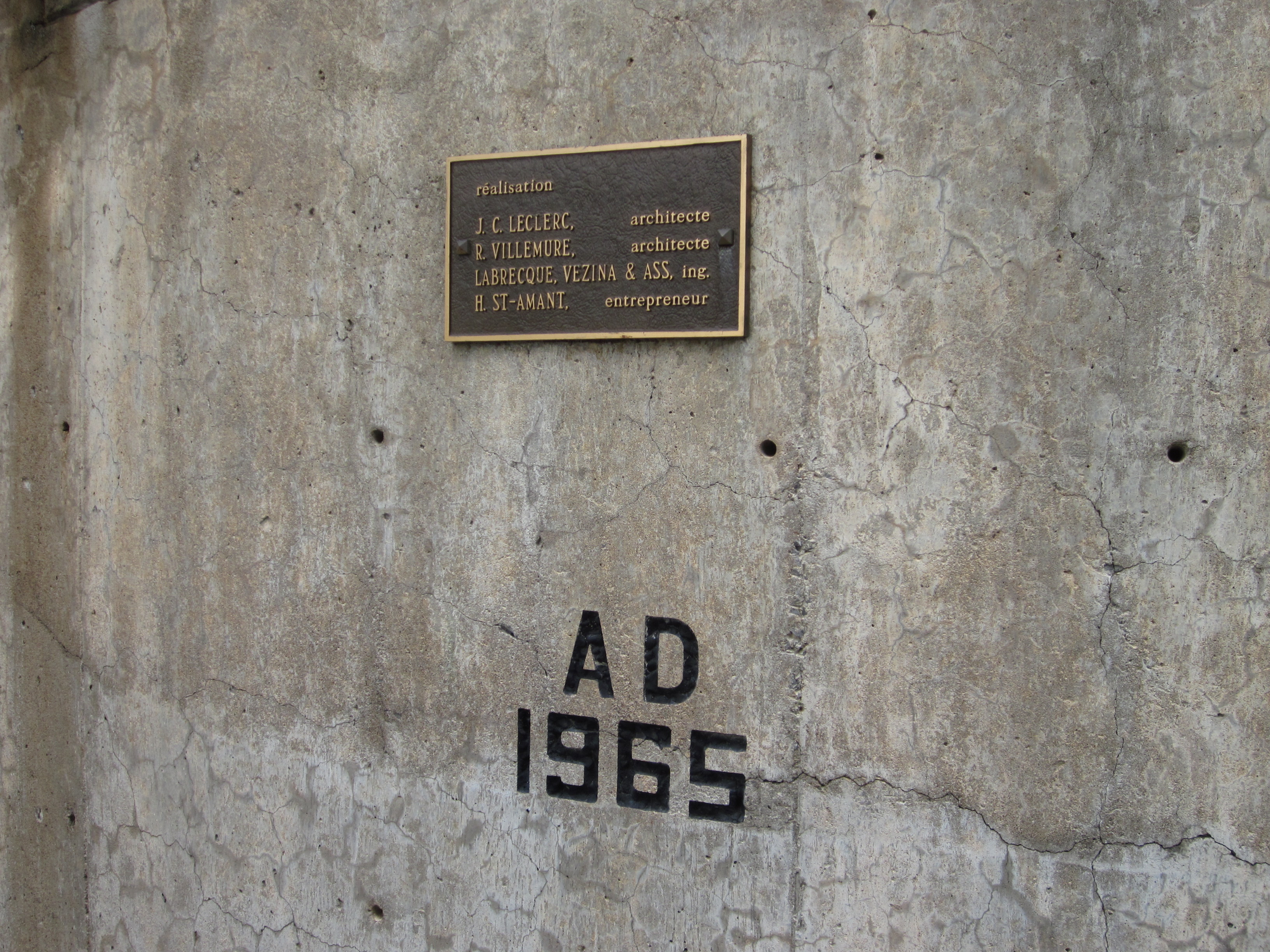 Mausolée des Évêques-de-Trois-Rivières, 3400, boulevard des Forges, Trois-Rivières (Canada). (Protection MH classé. Voir la liste des lieux patrimoniaux de la Mauricie pour plus de détails).